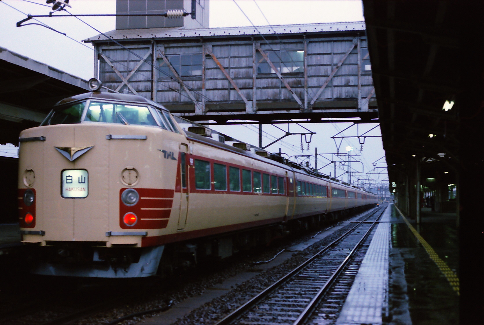 北陸本線 金沢駅 特急「白山」